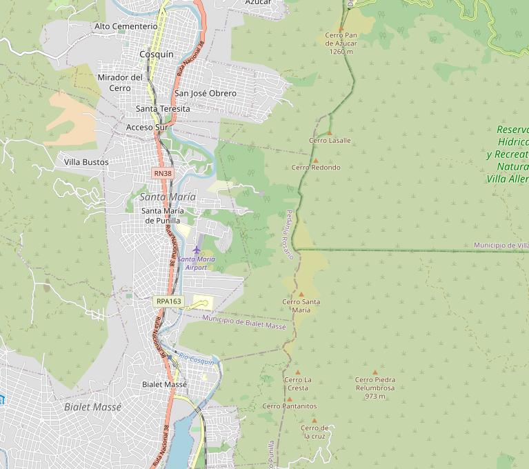 Ubicación de Santa María de Punilla